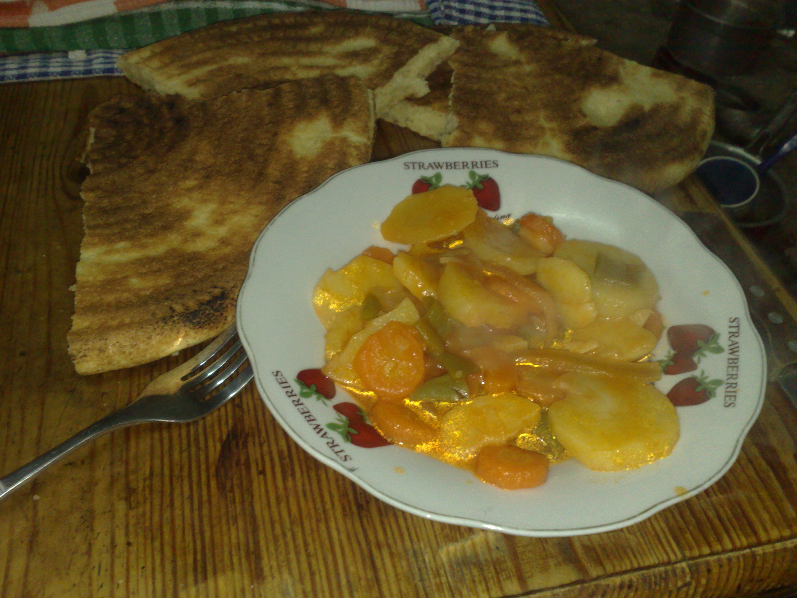 le pain des chaouis et plat de Pommes de terre avec les légumes